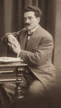 Félix Bermudes (1874-1960).